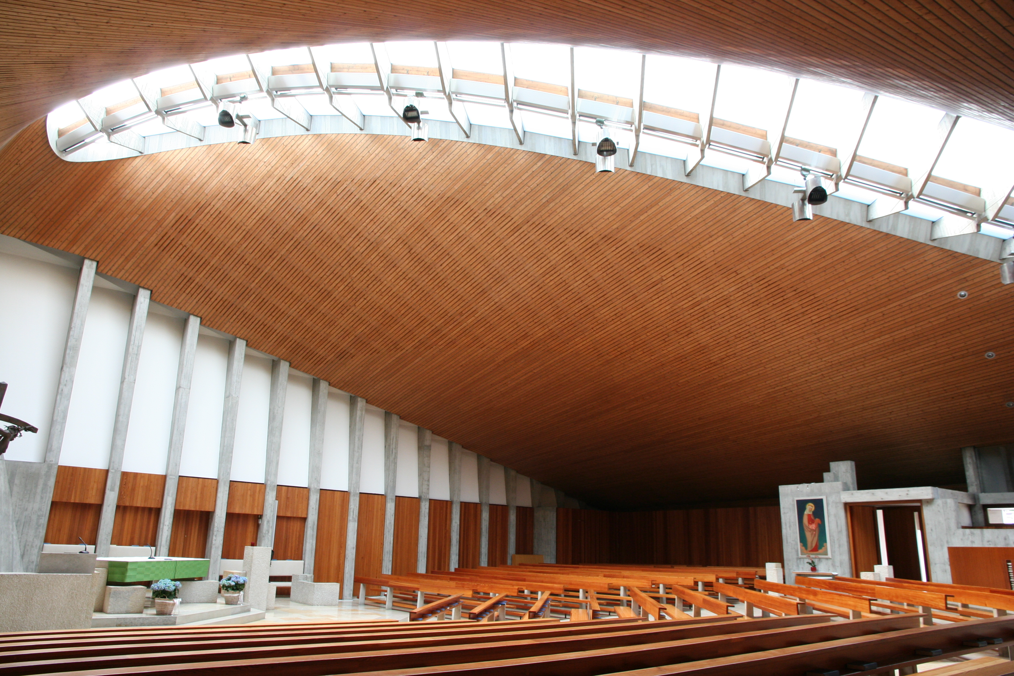 Römisch-katholische Pfarrkirche St. Elisabeth Kilchberg ZH, Innenansicht